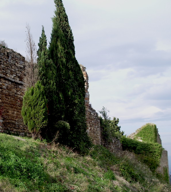 Tratto orientale delle Mura di Campagnatico